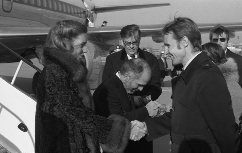 Staatsbesuch König Hussein II. und Königin Nur Al-Hussein in der Bundesrepublik Deutschland.